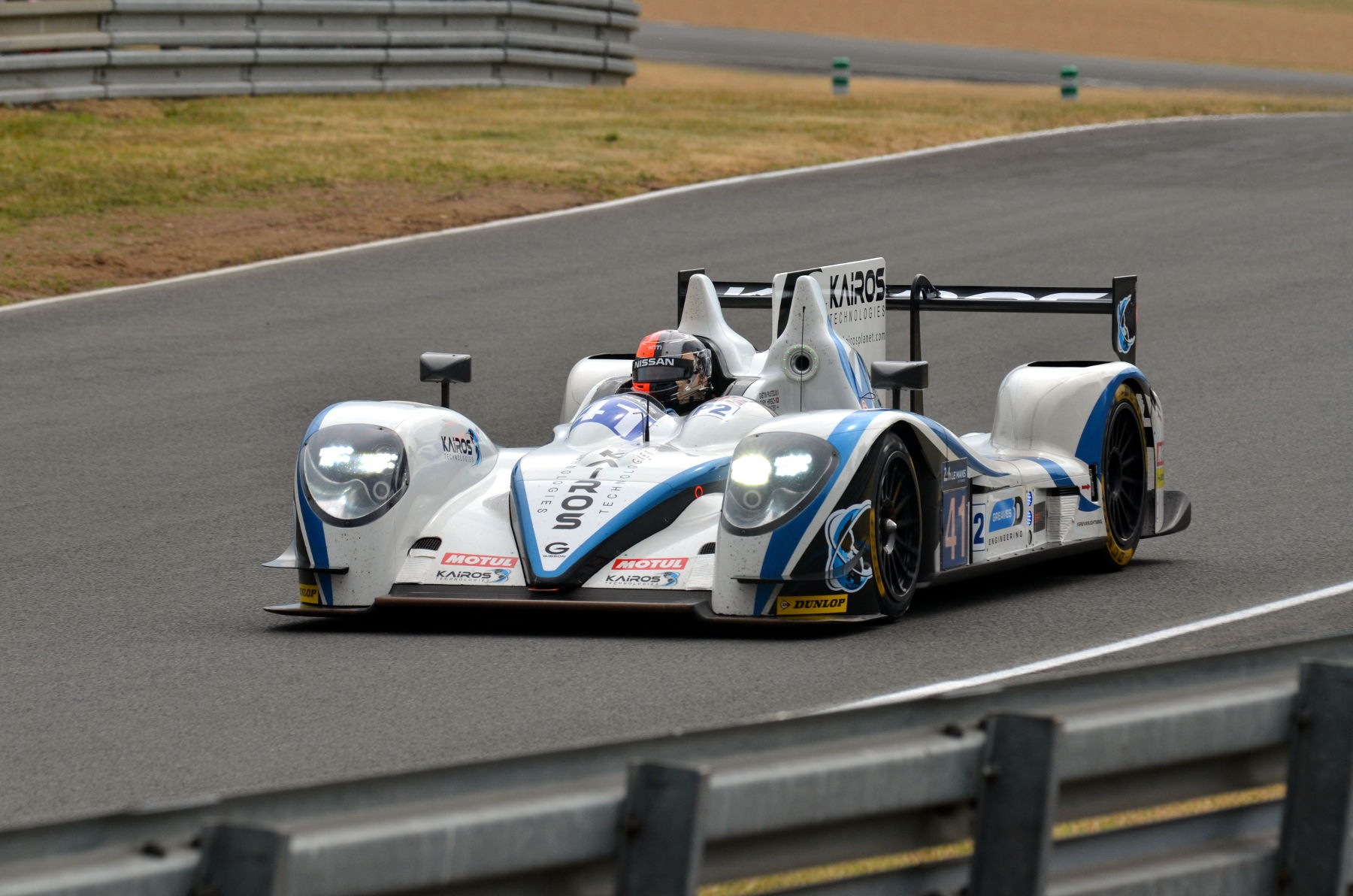 La Gibson 015S - Nissan de l'écurie Greaves Motorsport pilotée par Gary Hirsch, Gaëtan Paletou et Jon Lancaster lors des 24 Heures du Mans 2018